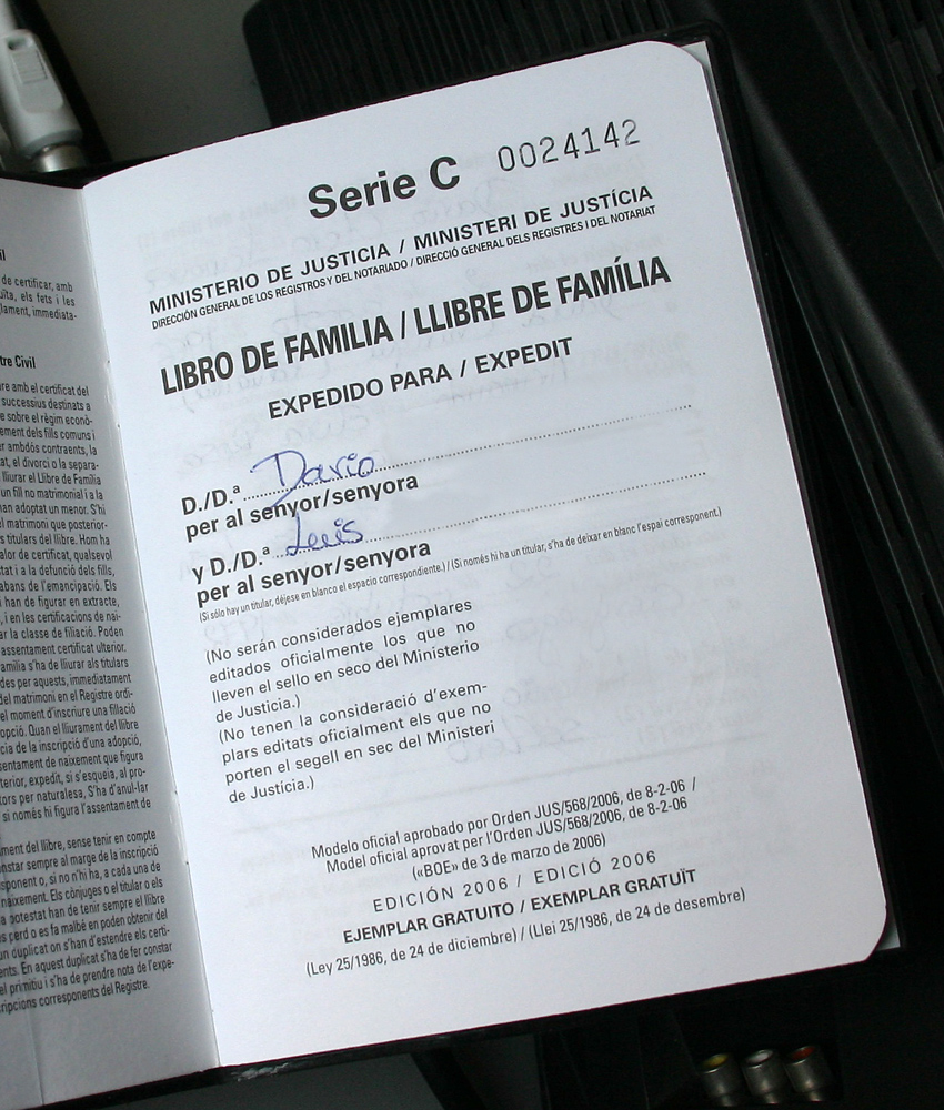 spanisches Familien- bzw. Stammbuch. Zweisprachig spanisch/valencianisch. (Vollständige Namen und Seriennummer unkenntlich gemacht)